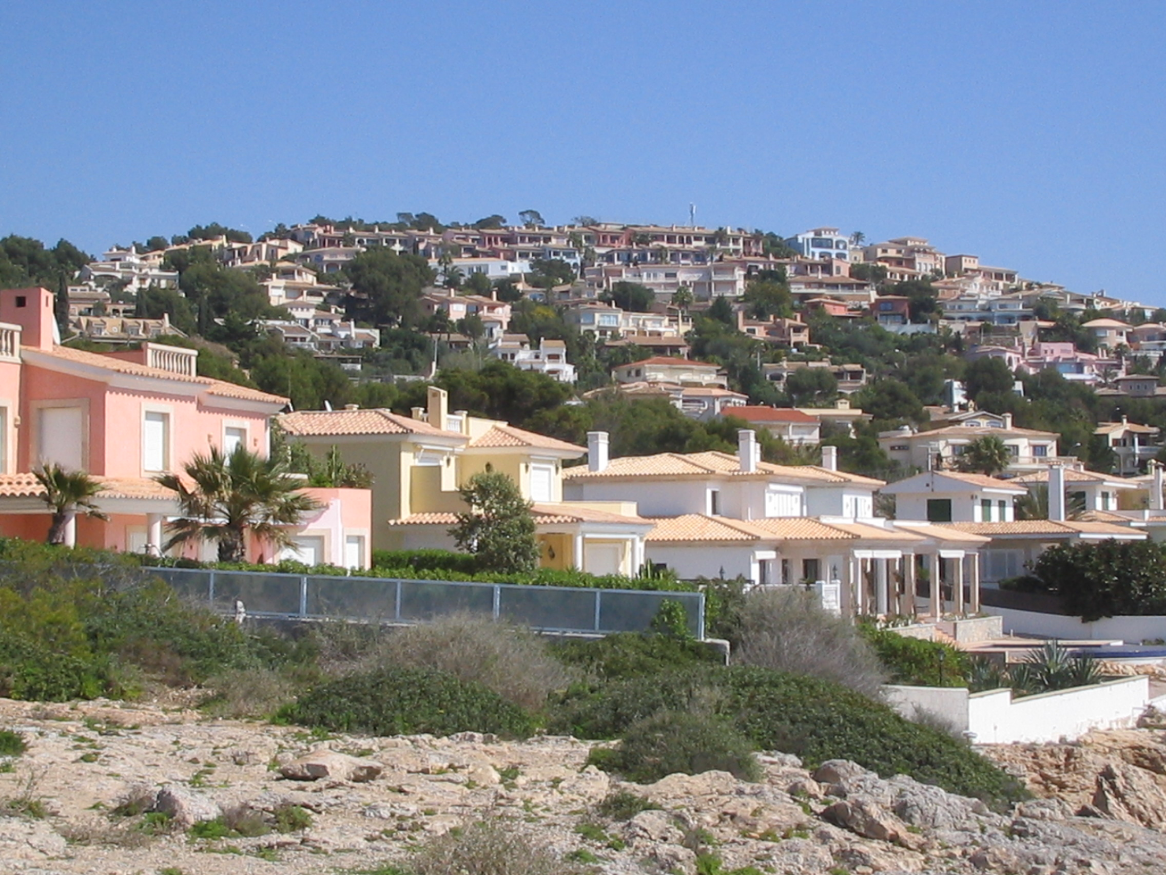 Residencial Area Called Nova Santa Ponsa in Mallorca Spain.